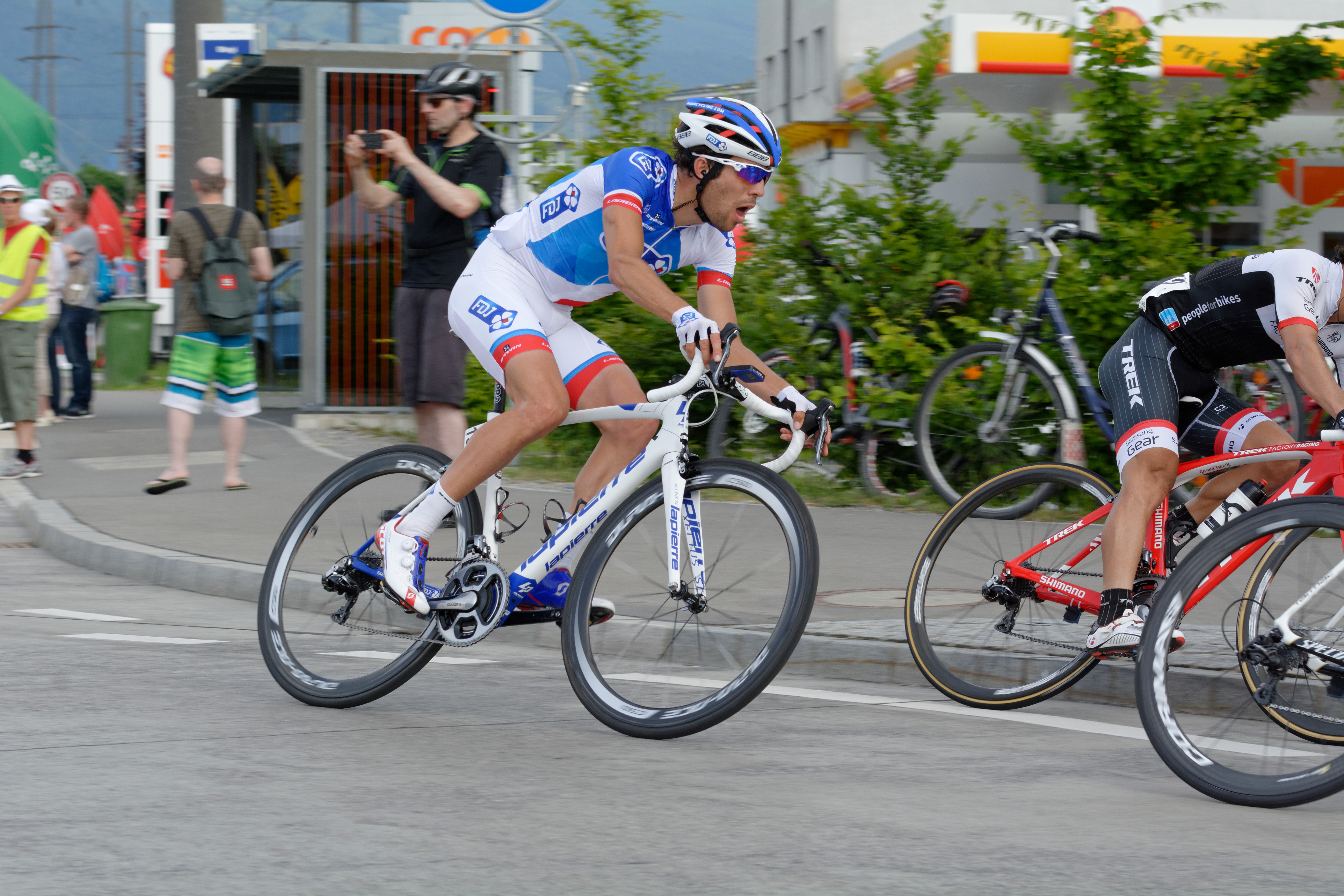 D71_0415_DxO